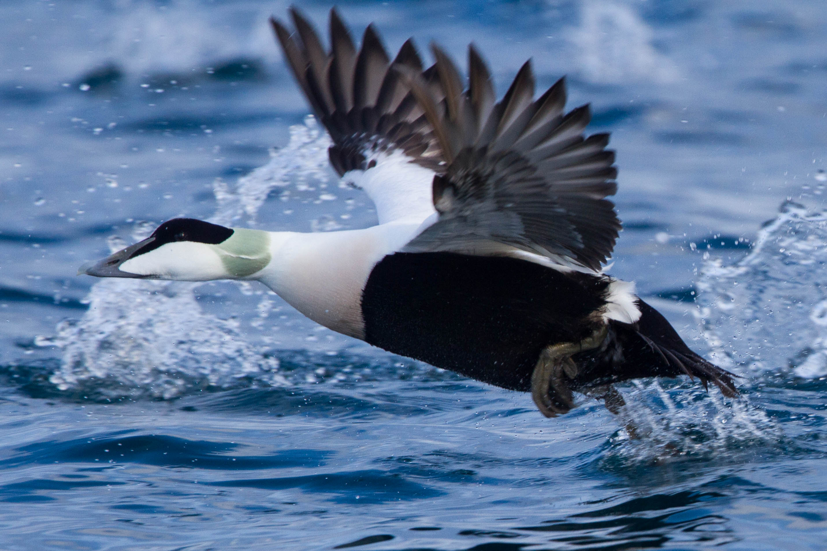 Common eider (Somateria mollissima) sea duck